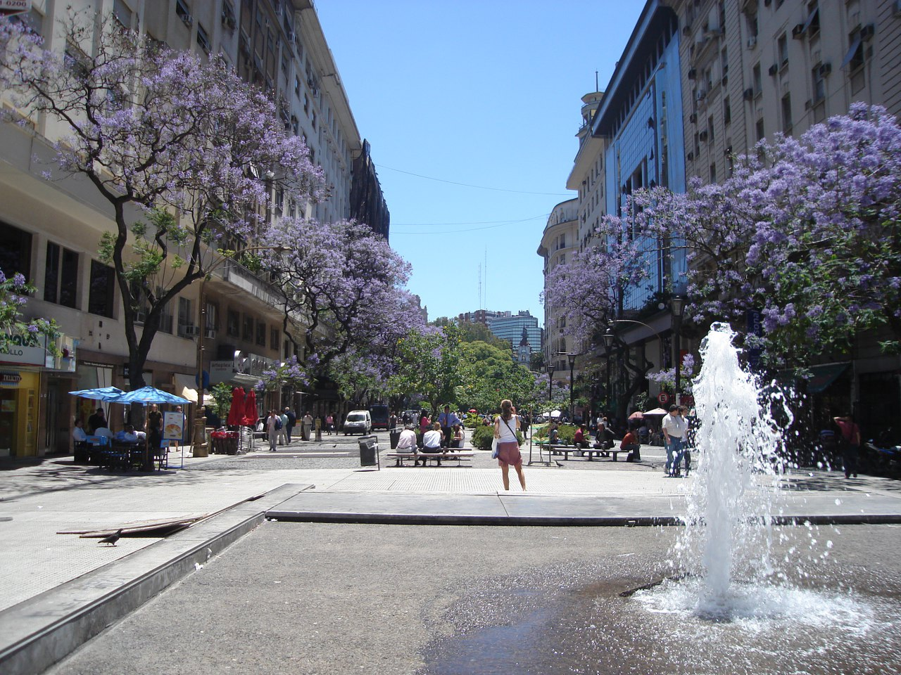 Vista de la última cuadra de la Avenida Presidente Roque Sáenz Peña de la Ciudad de Buenos Aires.